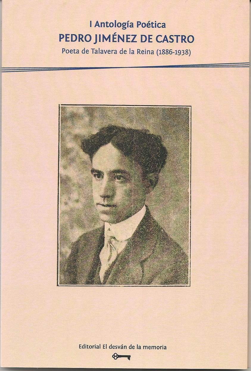 Portada del libro Antologia Poetica de Pedro Jimenez de Castro